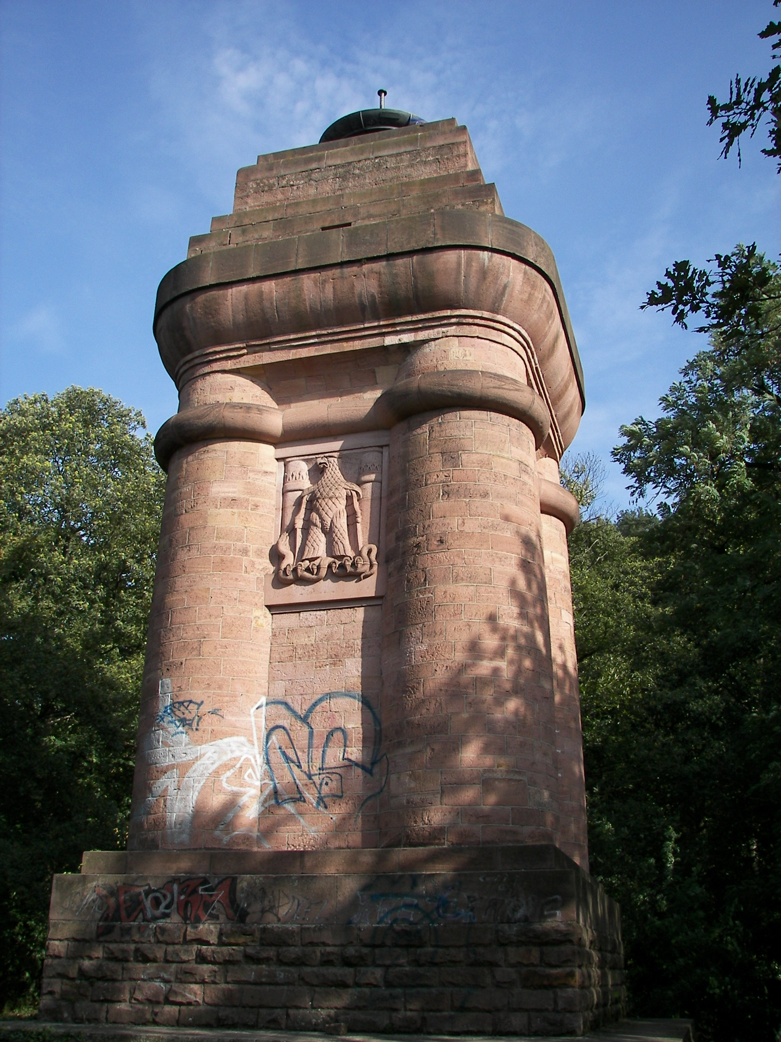 Bismarckturm Heidelberg